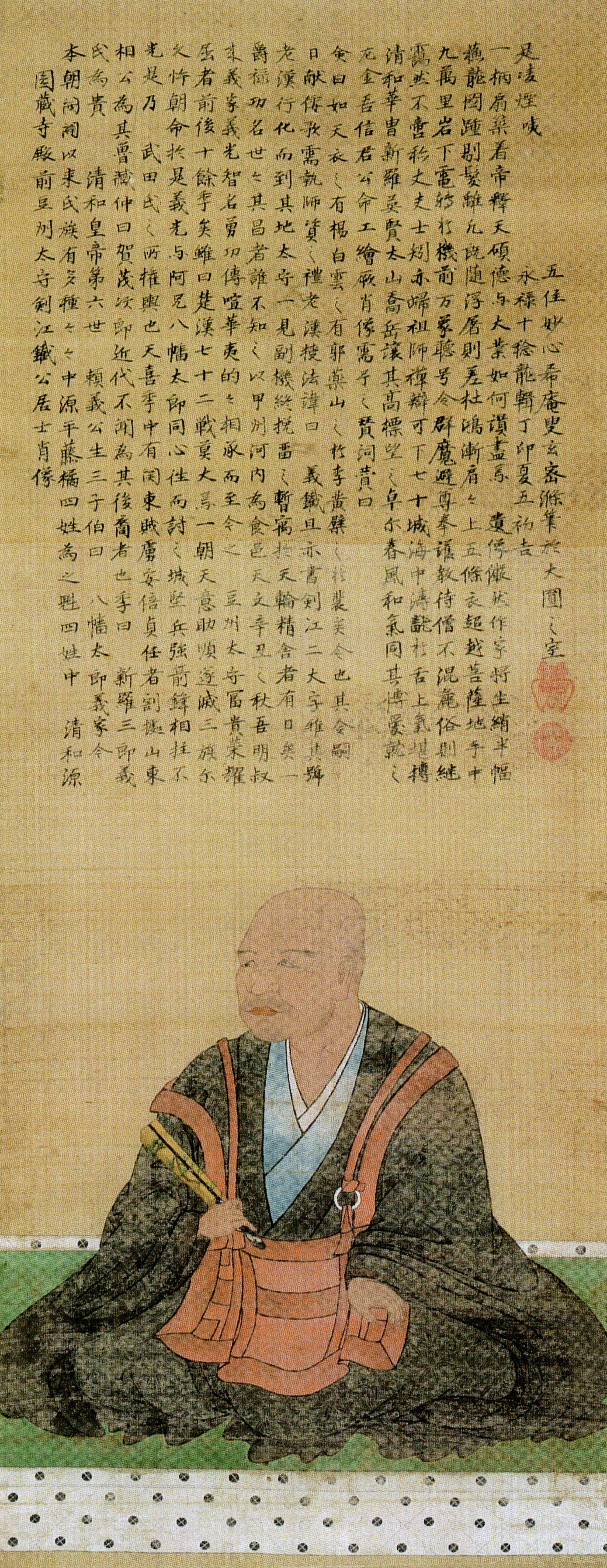 穴山信友の肖像。